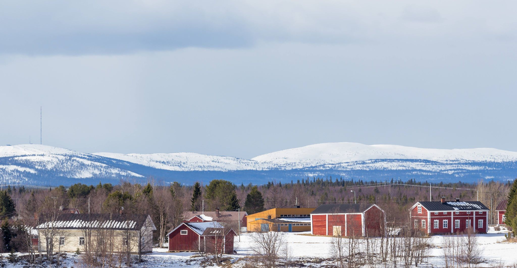 Kairalan kylä